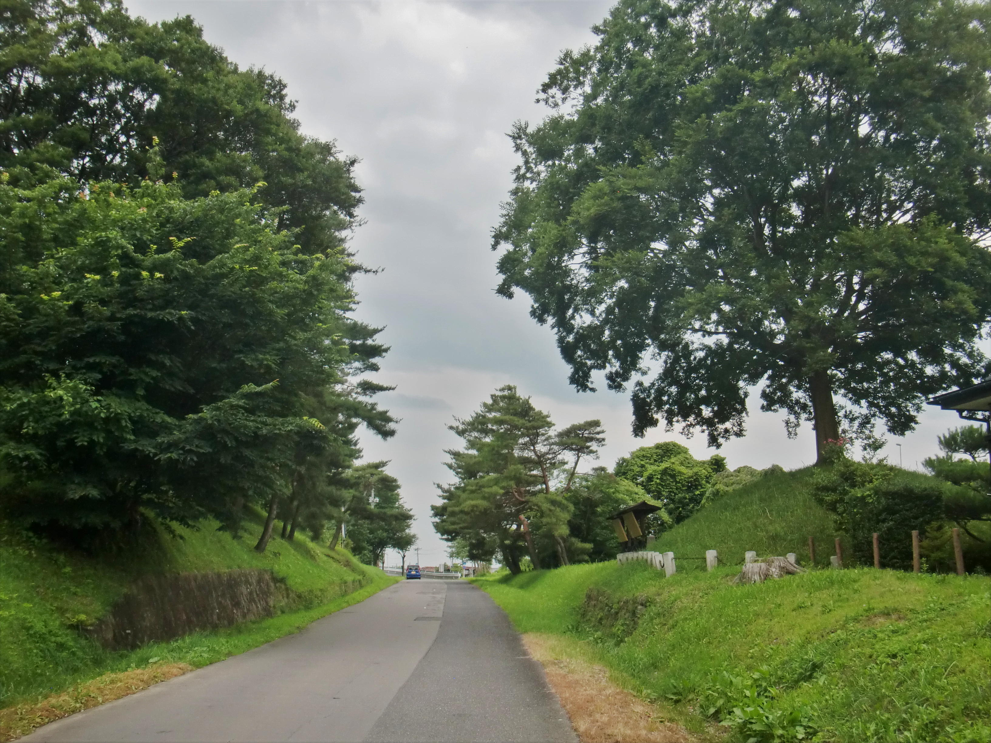 福島県須賀川市 須賀川一里塚付近